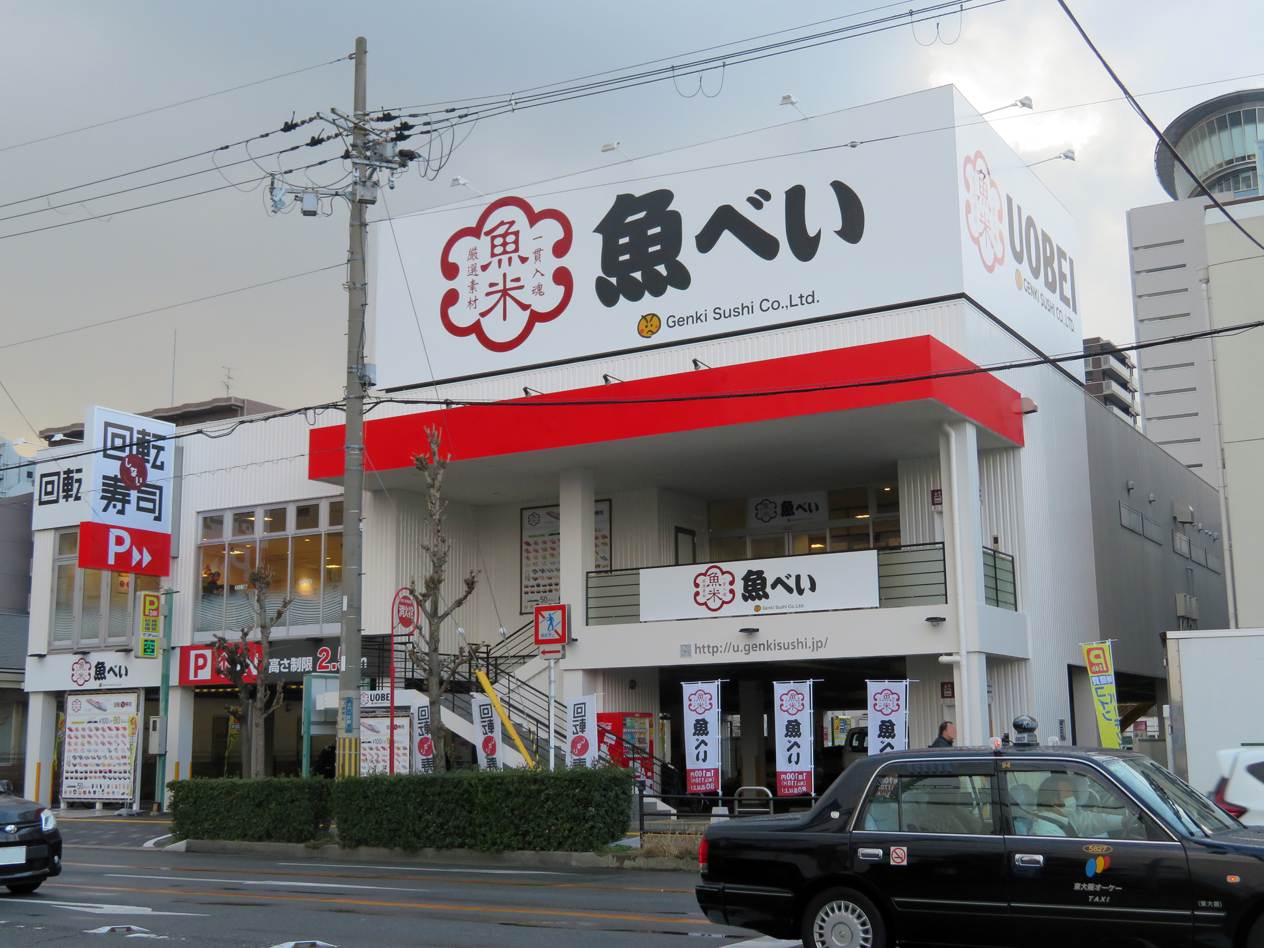 魚べい八尾光町店を撮影。